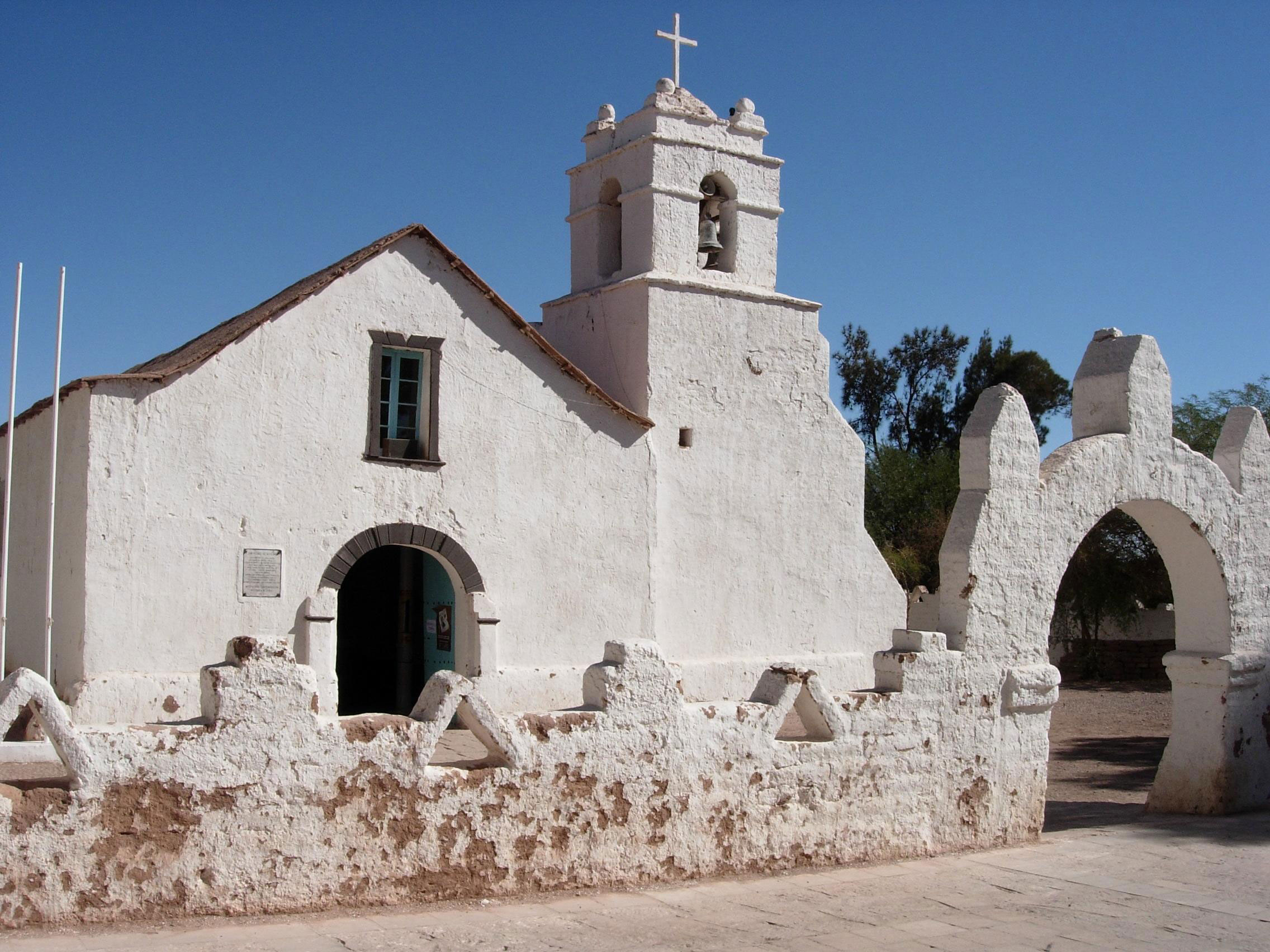 Die Stadtkirche von San Pedro de Atacama